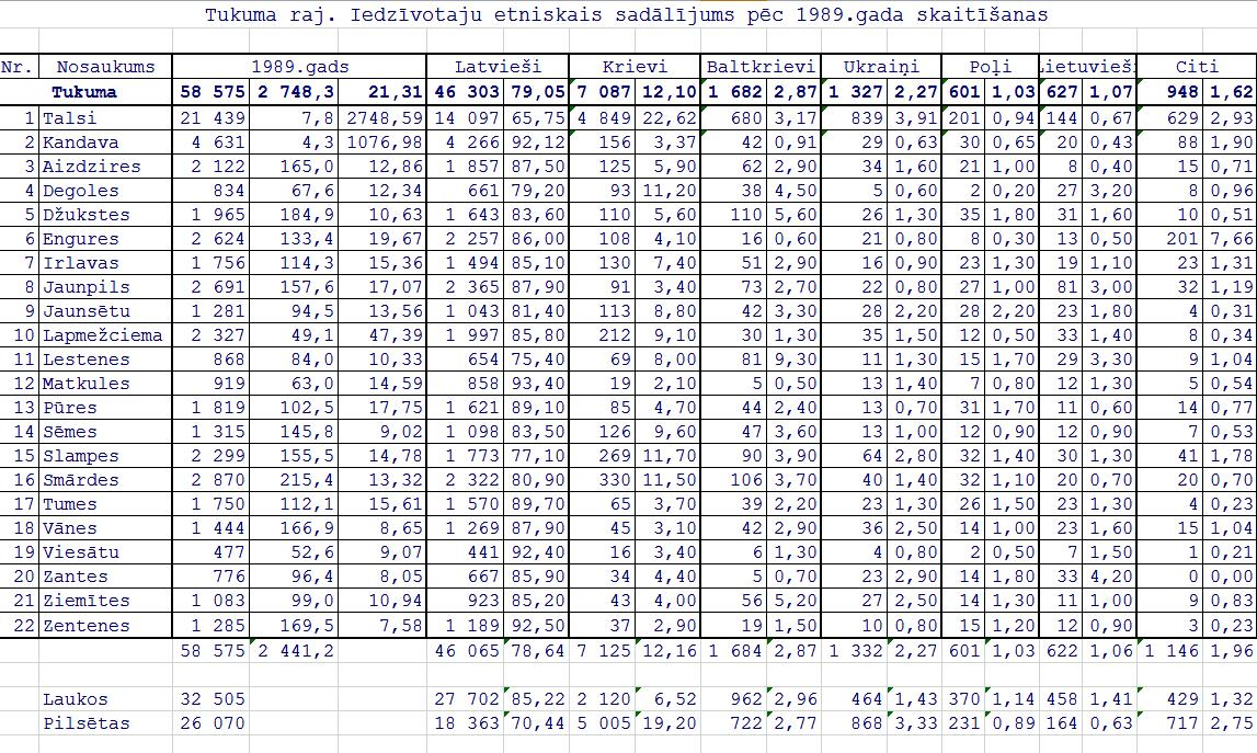 Этнический состав населения Латвии по переписи 1989 года